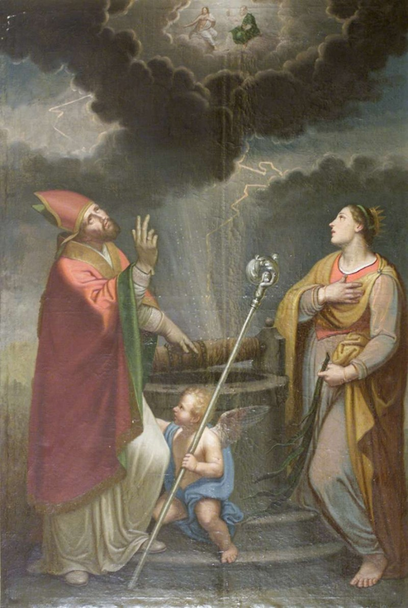 Trinità_appare_a_San_Spiridione_Vescovo_e_Santa_Barbara.jpg/ Diocesi di Bergamo